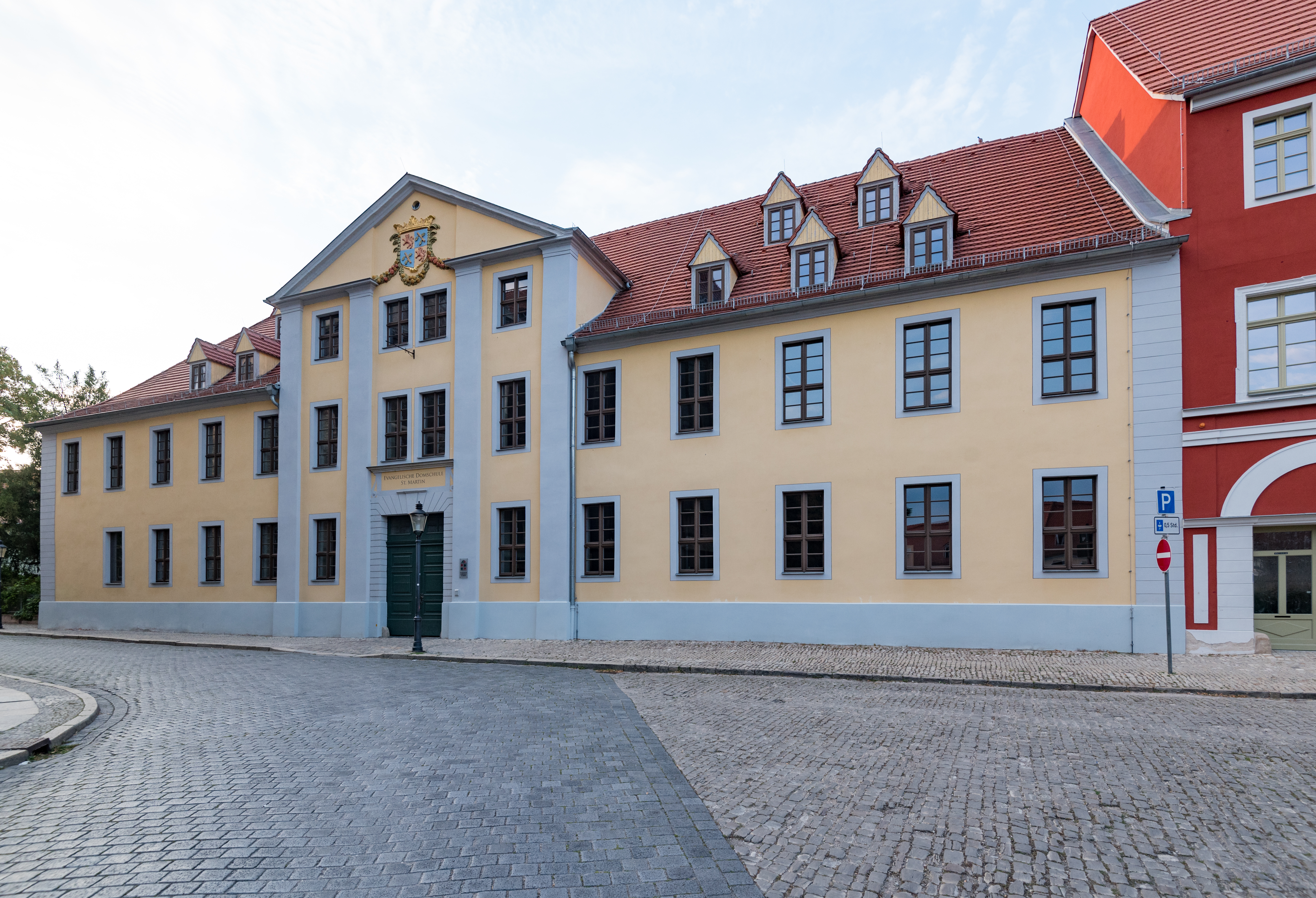 Naumburg (Saale), Domplatz 3